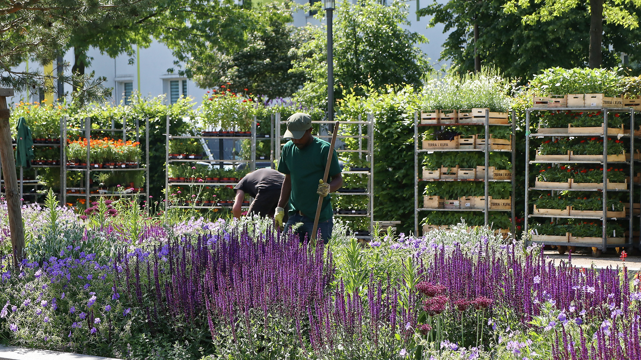 Gärtner beim Bepflanzen des Sommerflors